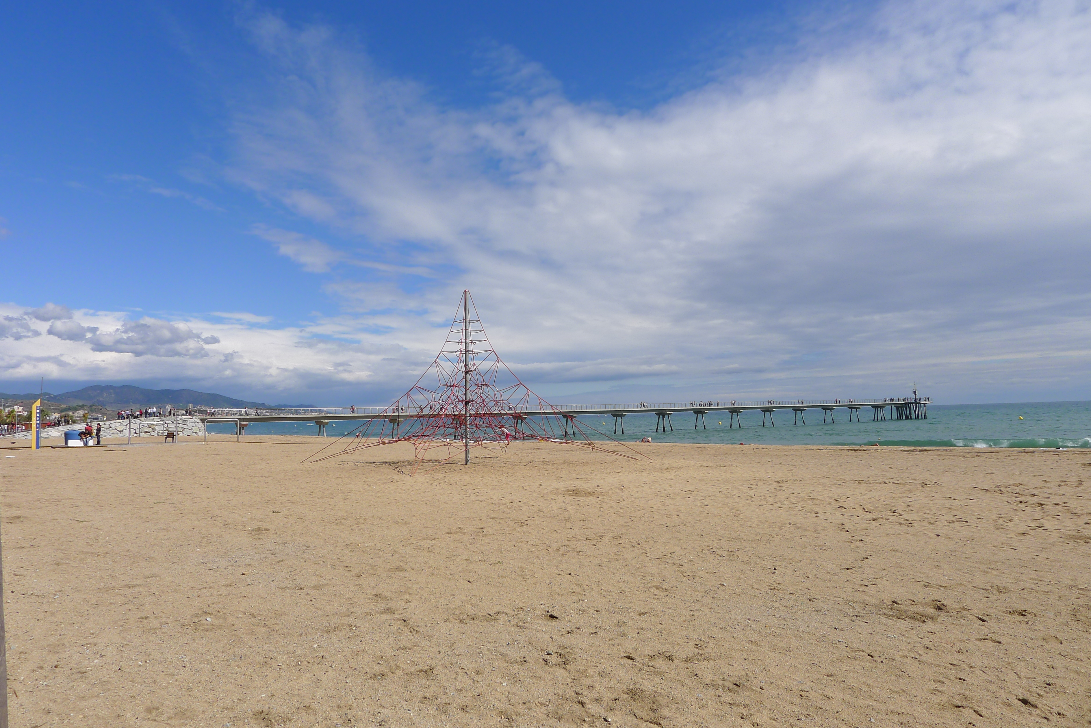 Playa de Badalona, vista desde el puerto